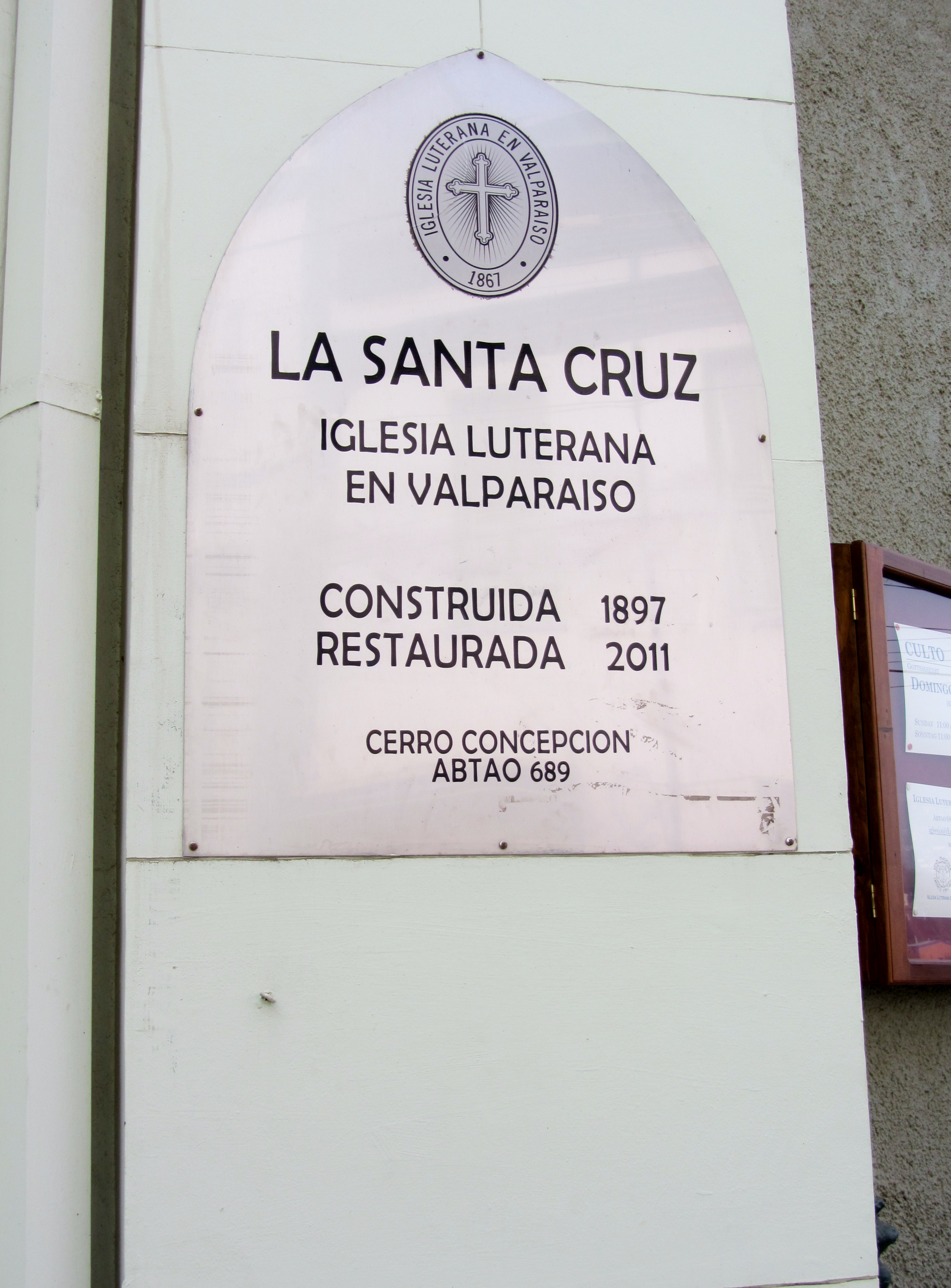 Placa de la iglesia luterana alemana La Santa Cruz, en Valparaíso